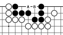 彎四（圍棋）